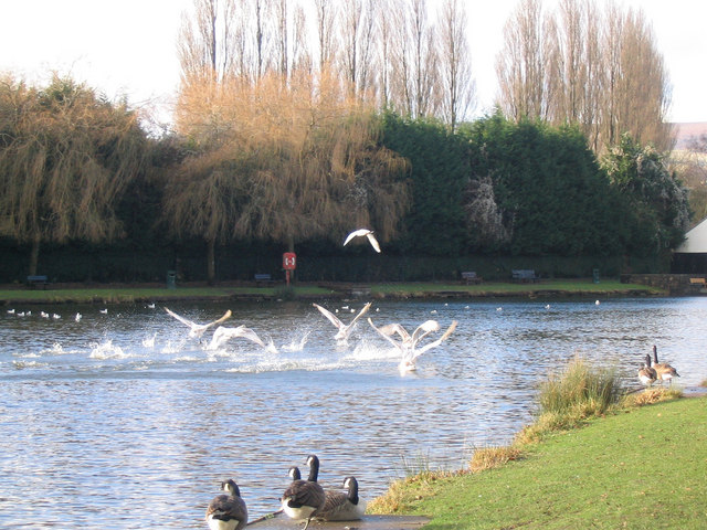 Ducks landing on Cwmbran 'Boating' Lake at Llanyrafon